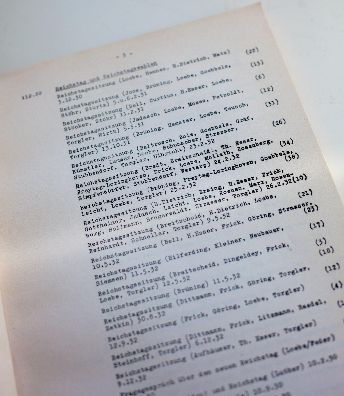 Gegen Ende des 2. Weltkriegs fanden Britische Truppen zahlreiche Schallfolien und Schallplatten des Deutschen Rundfunks, unter anderem Mitschnitte von Reichtagsdebatten der Weimarer Republik. Die BBC stellte 1945 deutsche Kriegsgefangene ein, um das Material zu erschließen. Dieses Dokument ist ein Transkript einer solchen ursprünglich handschriftlichen Erschließung von Reichstagssitzungen 1930–32 mit Namenslisten der Redner. Der Bestand ist in Kopie beim Deutschen Rundfunkarchiv in Frankfurt.